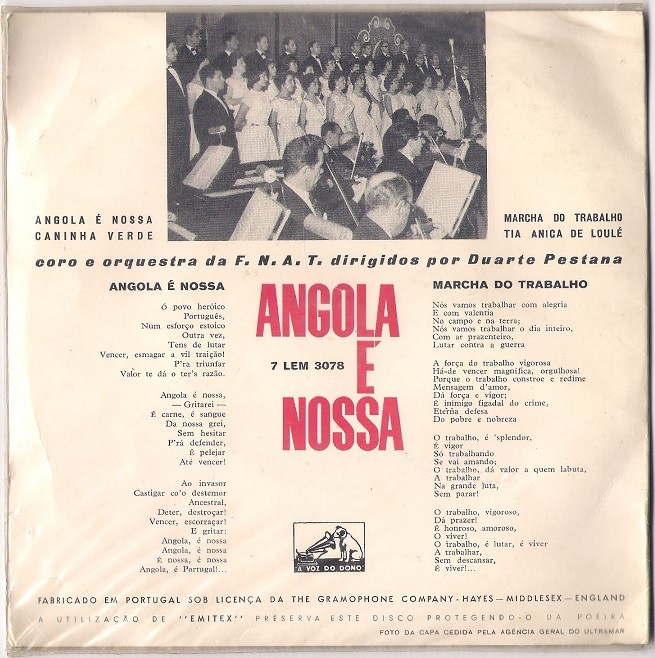 Contracapa do Álbum da Orquestra F.N.A.T Angola é Nossa em 1961 da editora A voz do Dono(His Masters Voice)